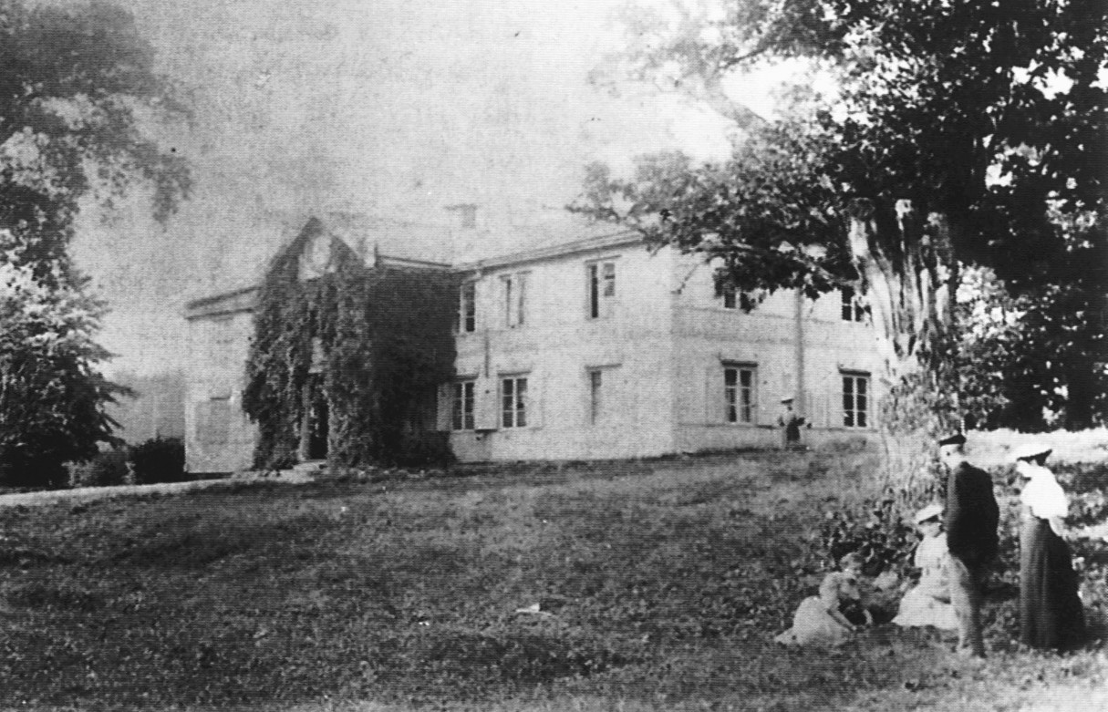 Hustegaholms herrgård på Lidingö på ett foto från 1895.